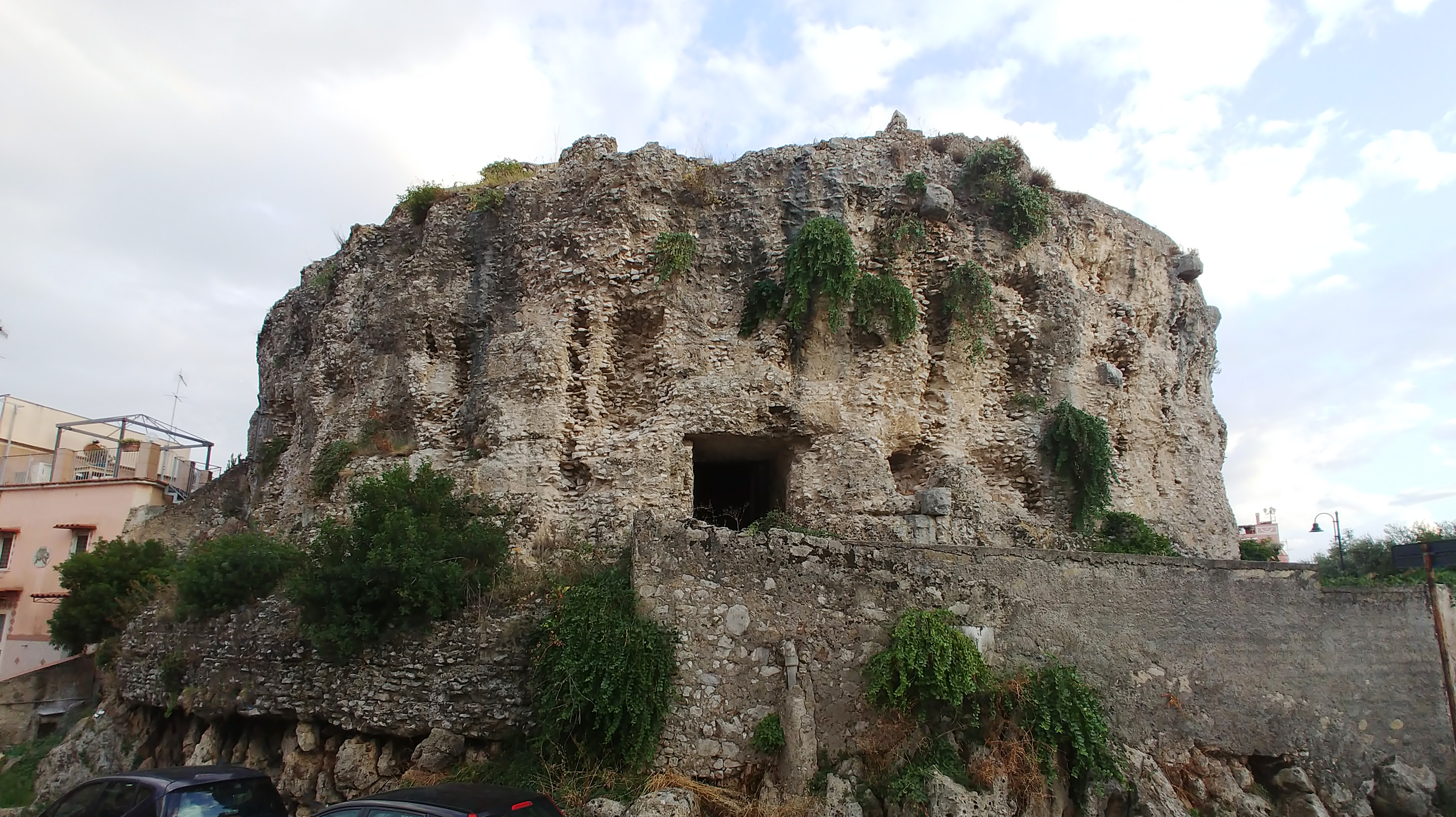 Veduta esterna da nord.